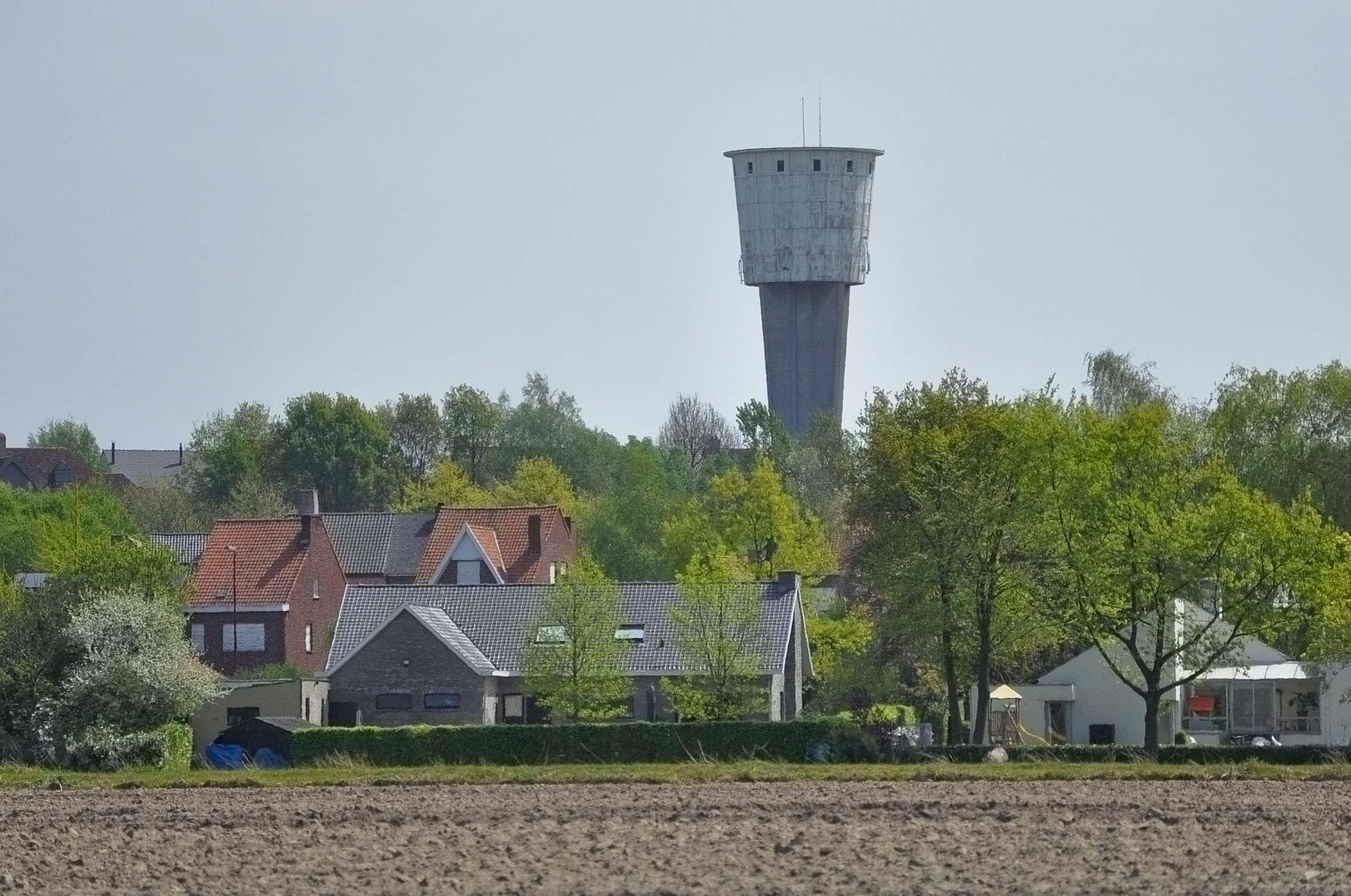 De watertoren van Merelbeke, België